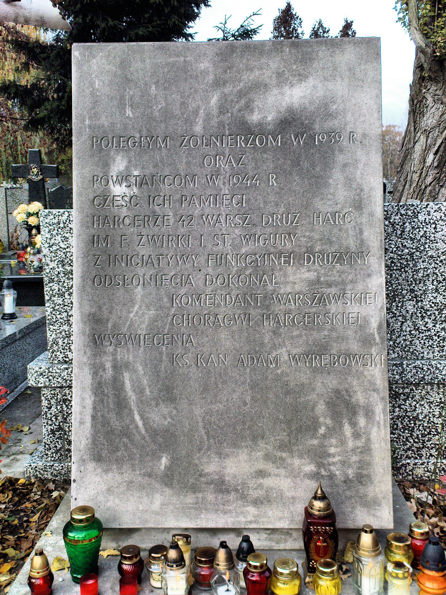 POLEGŁYM ŻOŁNIERZOM W 1939 R ORAZ POWSTAŃCOM W 1944 R - CZEŚĆ ICH PAMIĘCI HARCERZE 42 WARSZ. DRUŻ. HARC. IM. F. ŻWIRKI I ST. WIGURY Z INICJATYWY FUNKCYJNEJ DRUŻYNY ODSŁONIĘCIA DOKONAŁ KOMENDANT WARSZAWSKIEJ CHORĄGWI HARCERSKIEJ WYŚWIĘCENIE KS KAN ADAM WYRĘBOWSKI